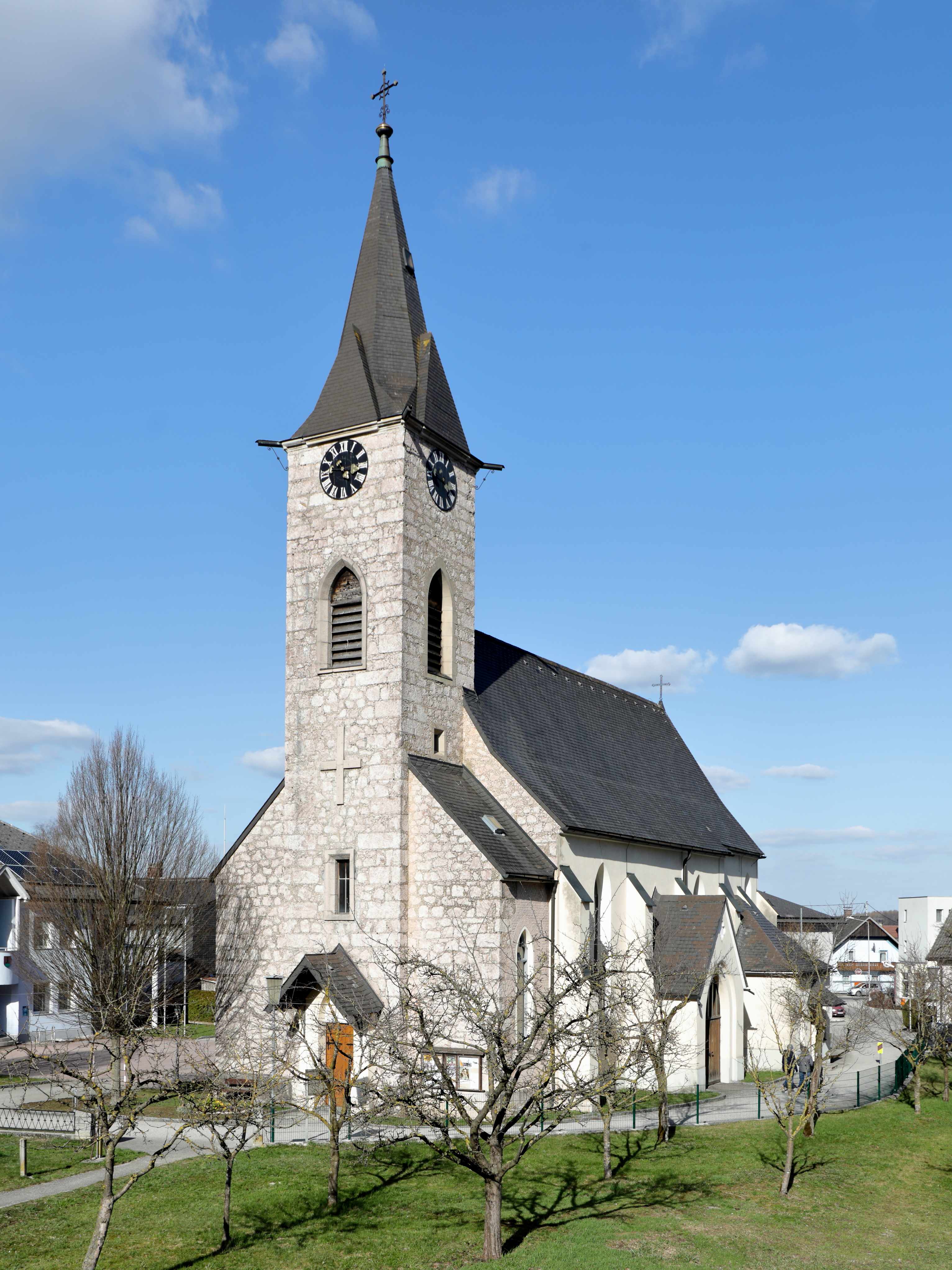 Südwestansicht der röm.-kath. Pfarrkirche hl. Matthias in der oberösterreichischen Gemeinde Pinsdorf. Ein spätgotischer Sakralbau aus der ersten Hälfte des 17. Jahrhunderts, der 1892/93 umgebaut und erweitert wurde.